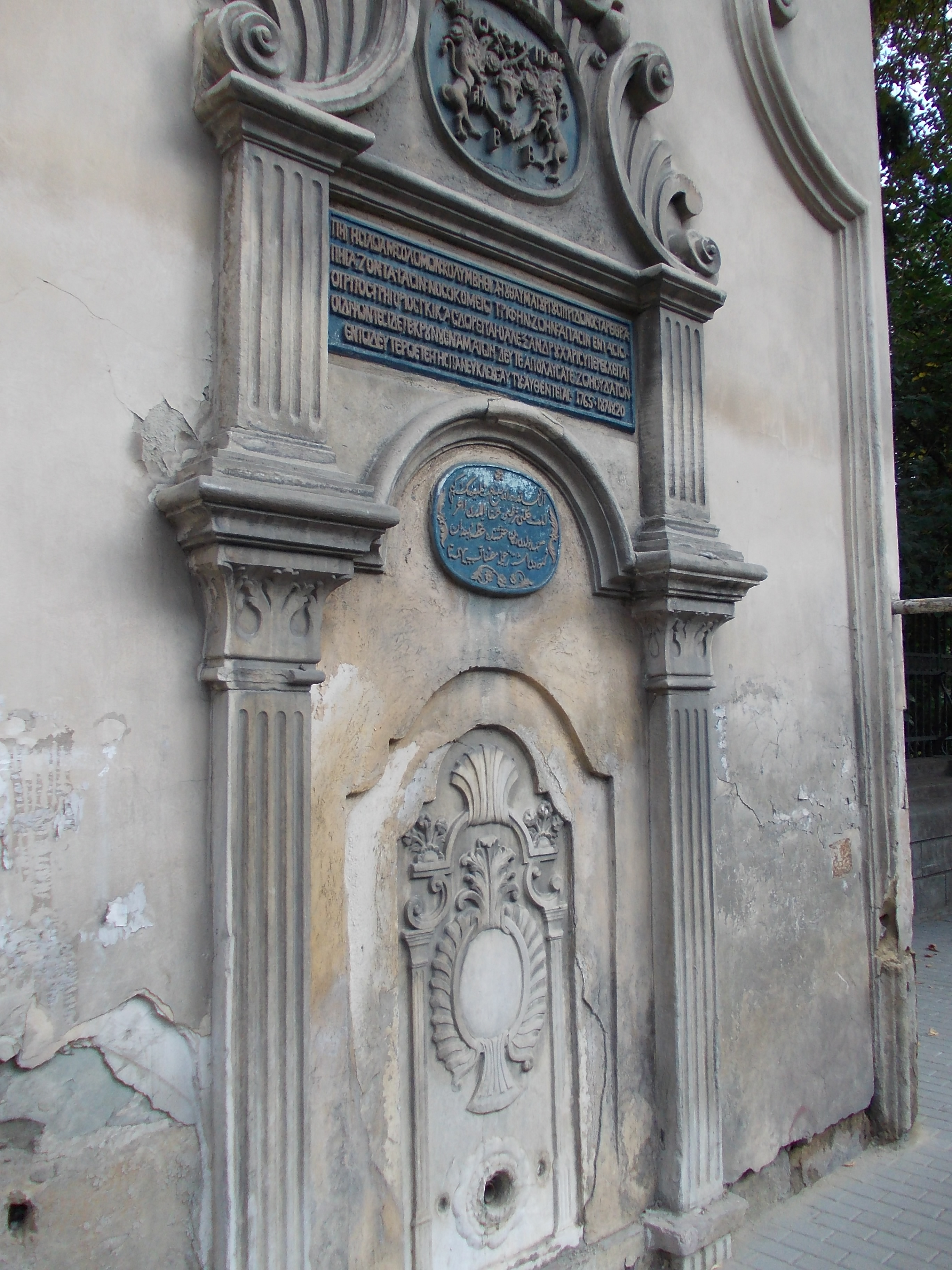 Detaliu al turnului de clopotniţă aparţinând bisericii Sf Spiridon din Iaşi 10